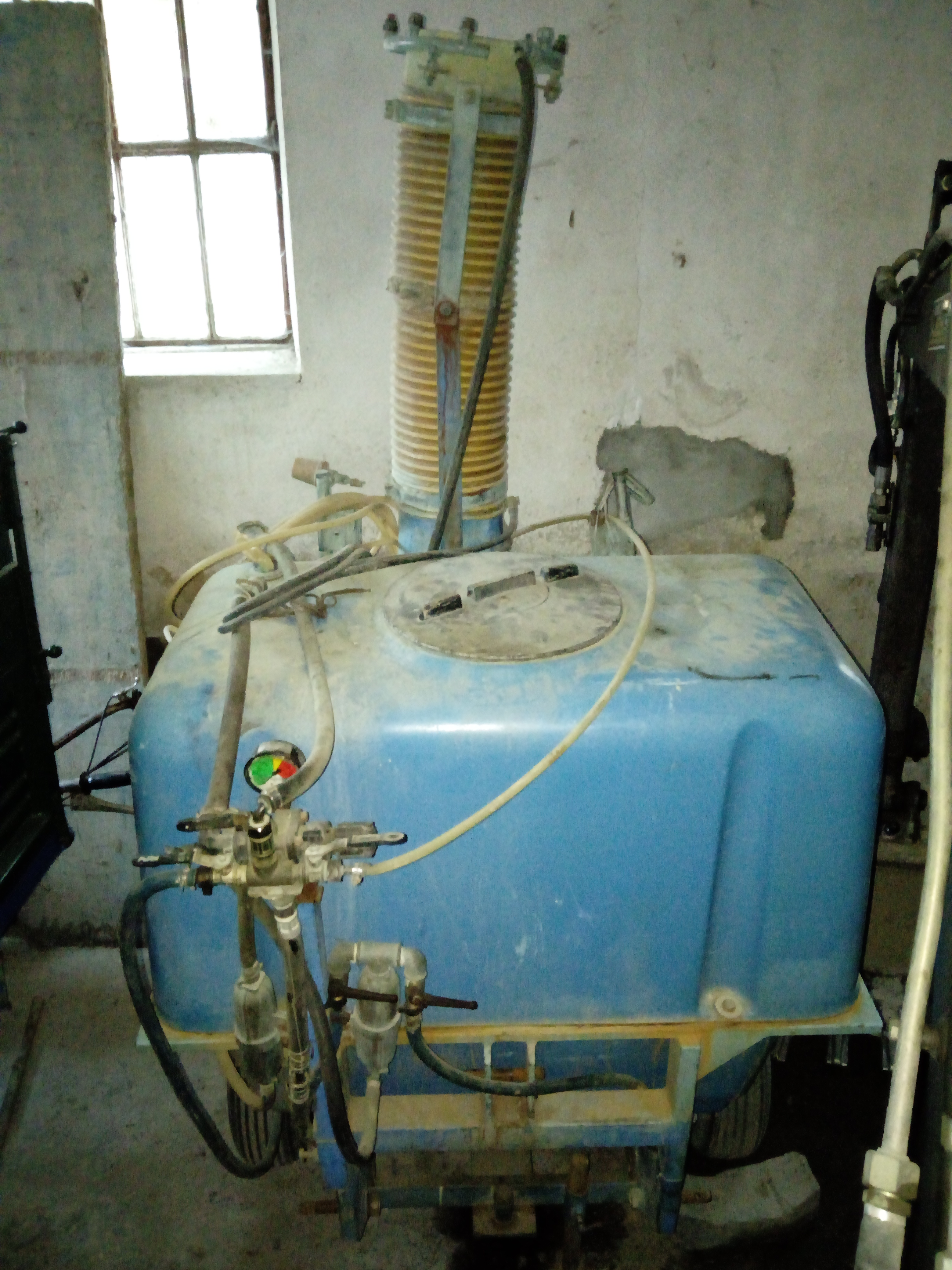 particolare di un atomizzatore a lunga gittata, da notare la grossa tubazione posta sul retro della macchina.